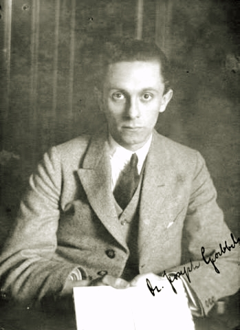 Ritratto autografato - Dr.phil. Joseph Goebbels, 1921